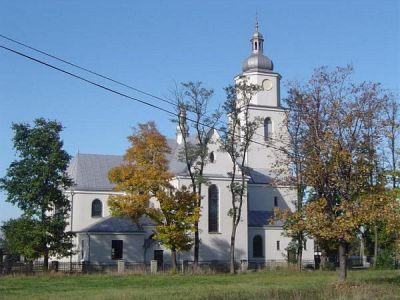 Kryg - rzymskokatolicki kościół parafialny pw. NMP Królowej Polski, 1933-1934